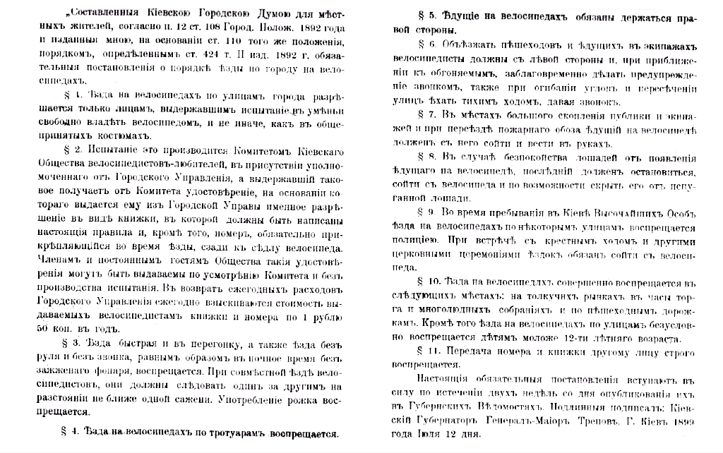 О порядке езды по городу Киеву на велосипедах